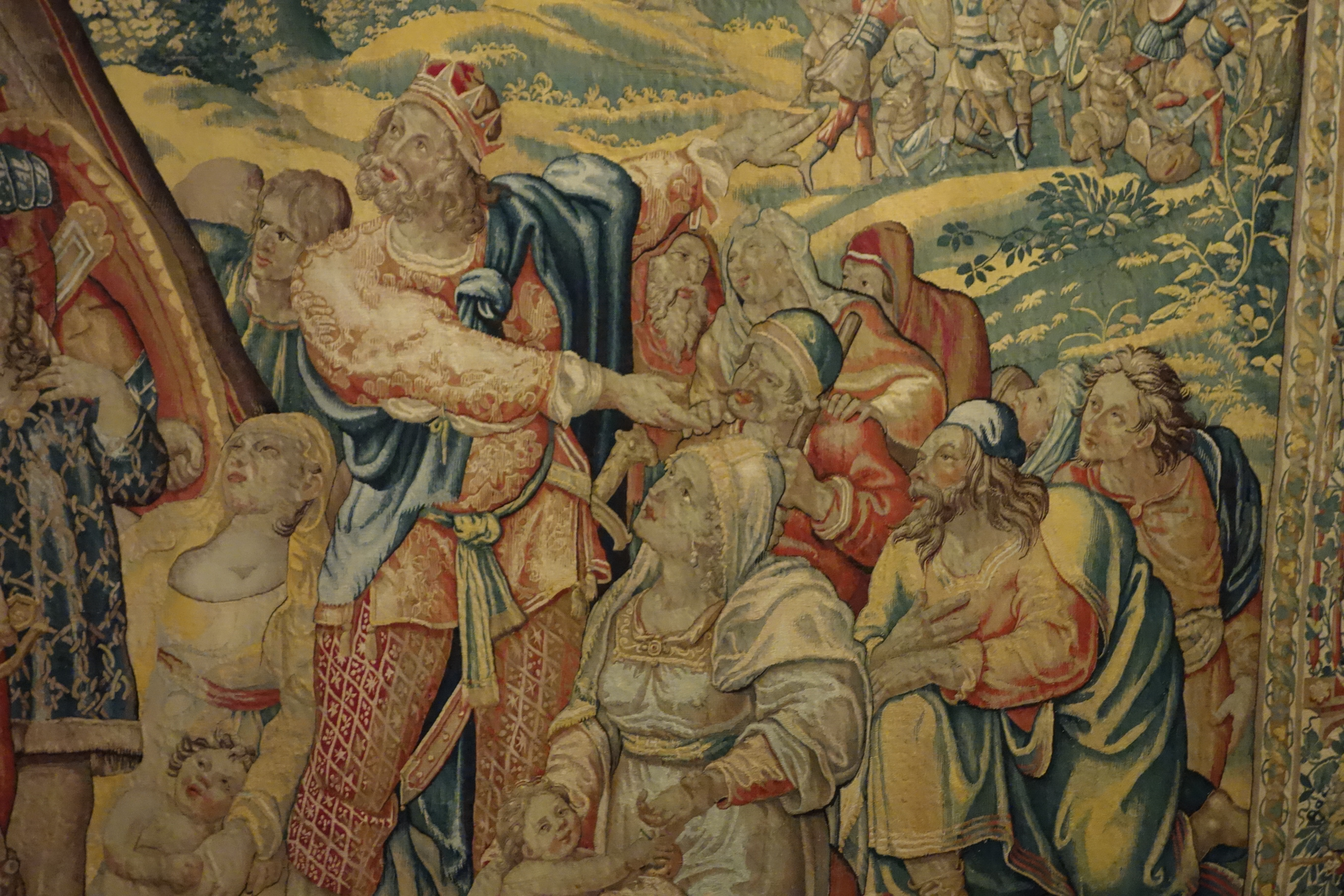 Agrippa, re di Tiberiade, perora la causa della città minacciata di distruzione di fronte a Vespasiano - detail